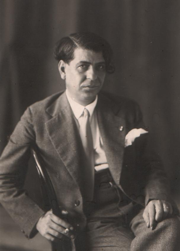 Foto del maestro GIUSEPPE MULE'